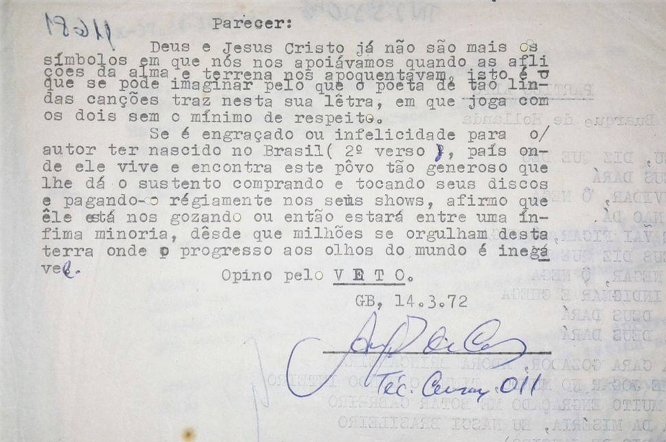 Fundo: Serviço de Censura de Diversões Públicas. .